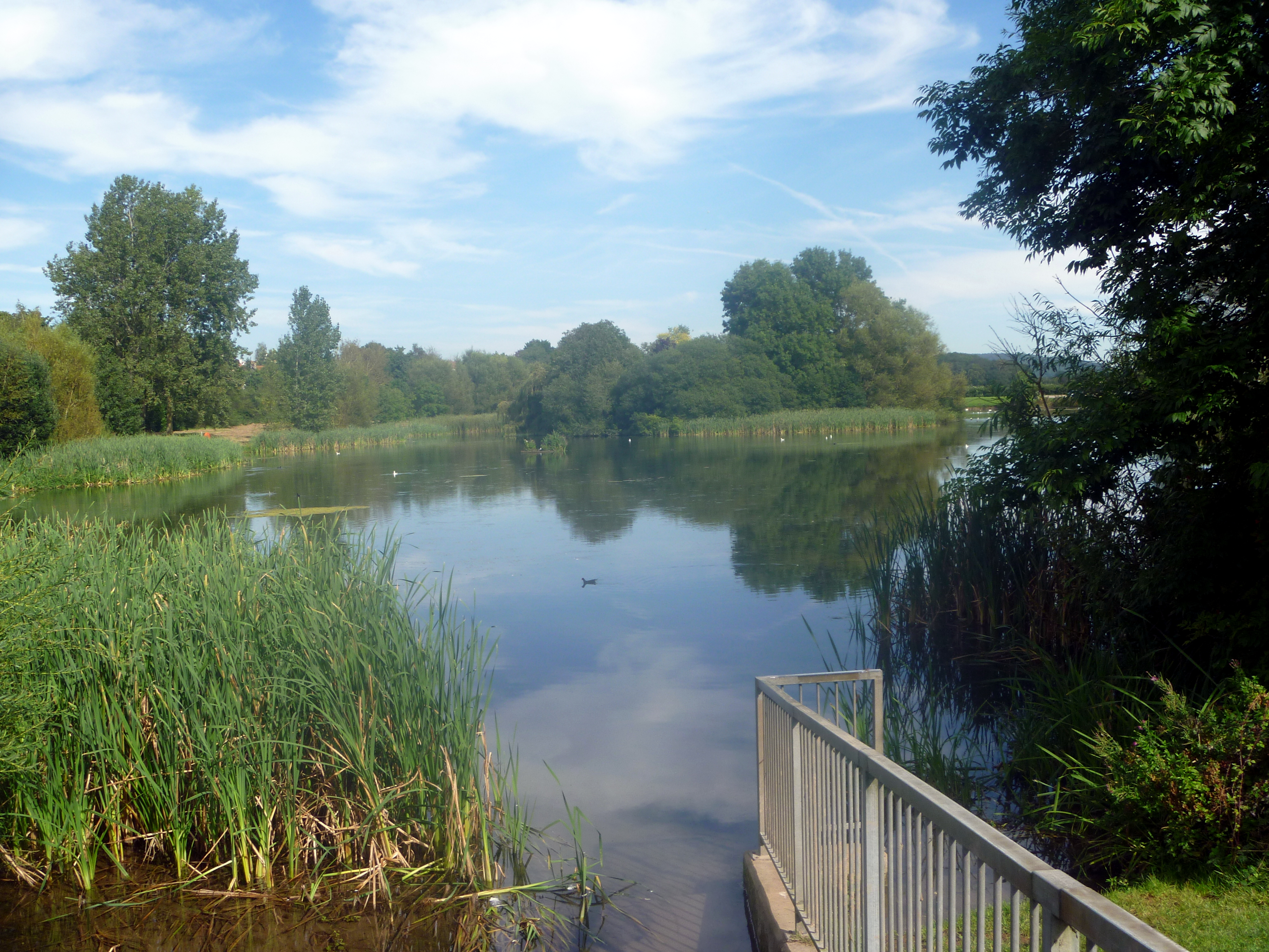 Backwell lake.